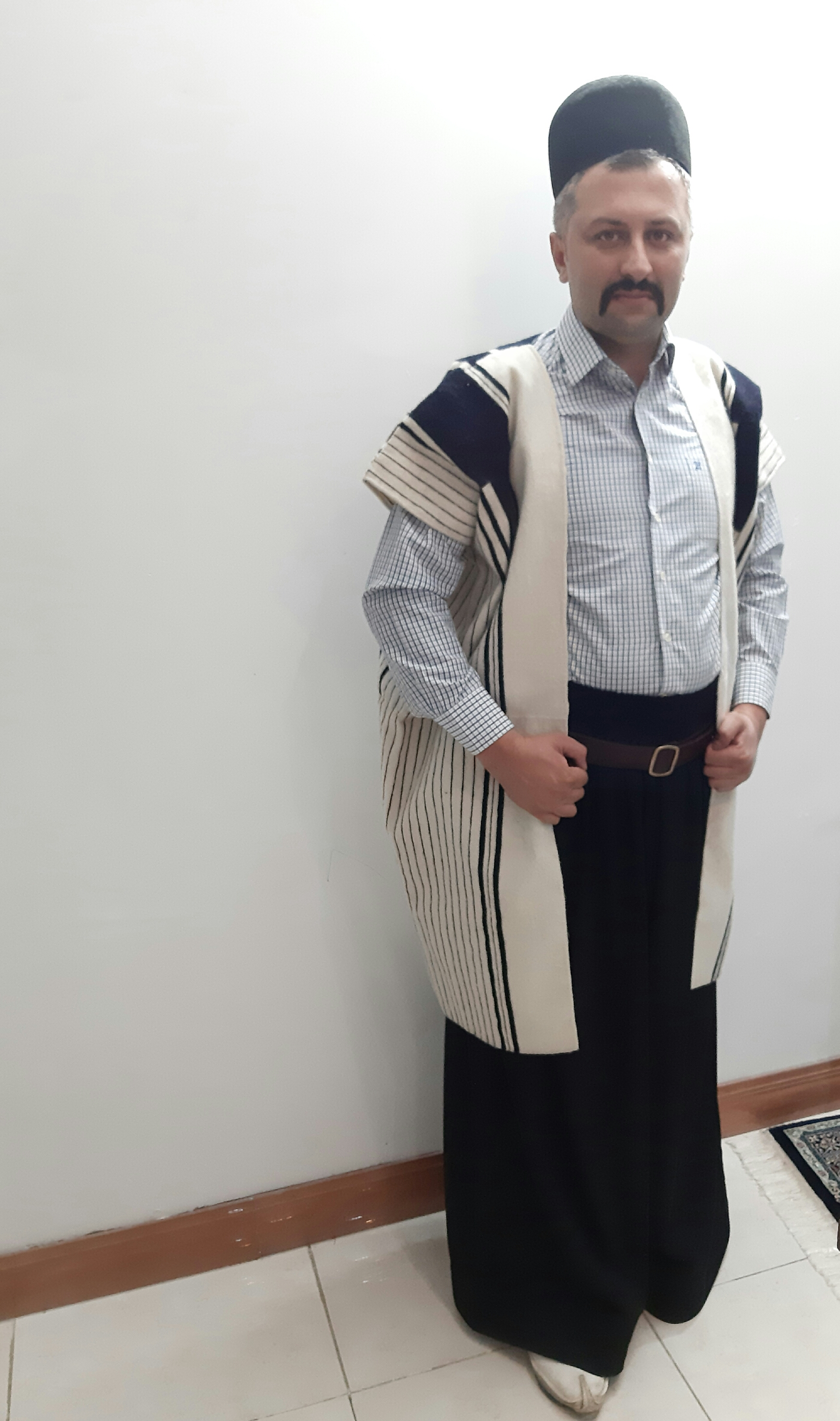 دبیت حاج علی اکبری گیوه ملکی چوقا کیارسی بف و کمربند افسری.